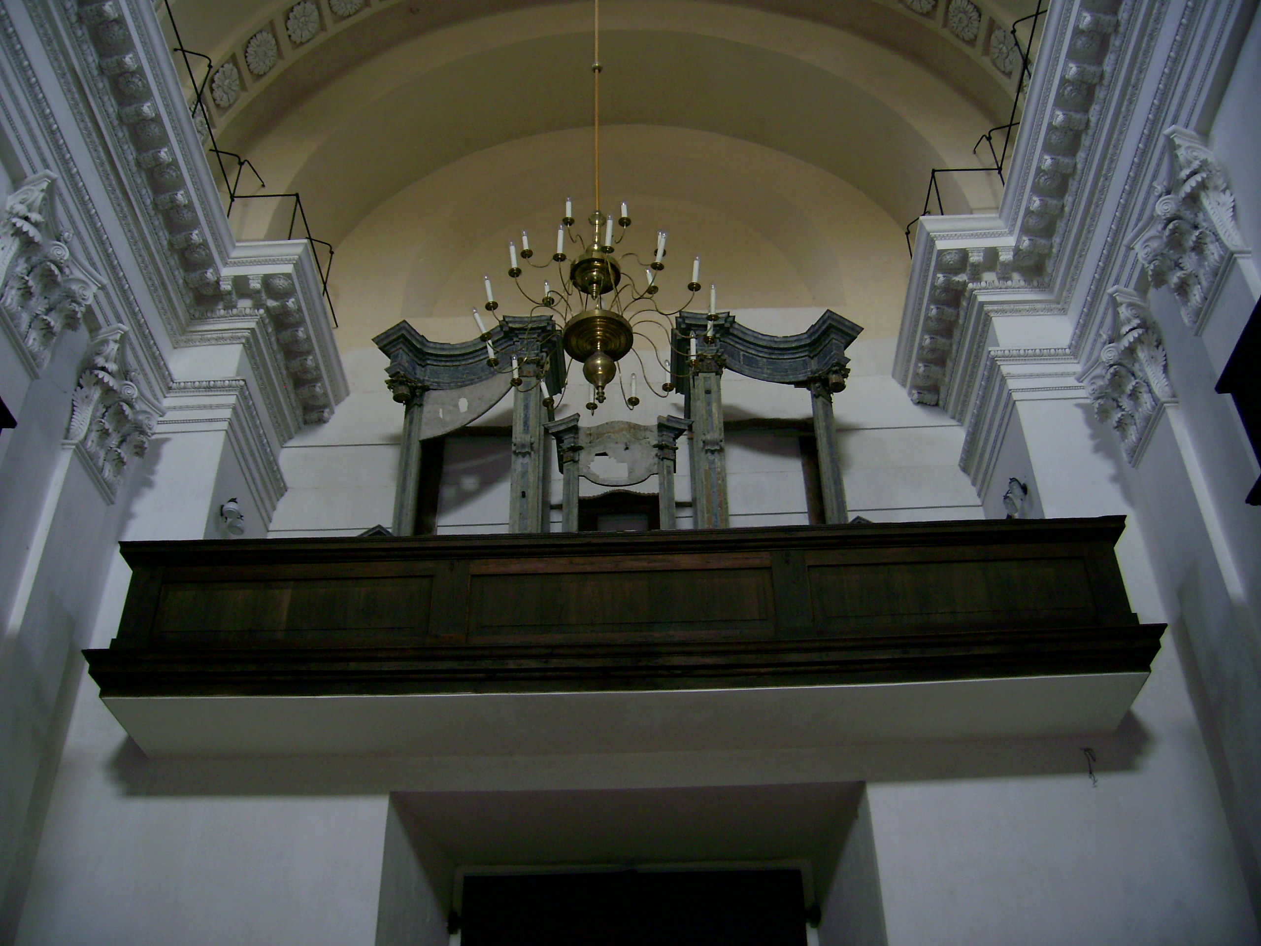 Хмельницька обл. Славута . Церква Святої Дороти